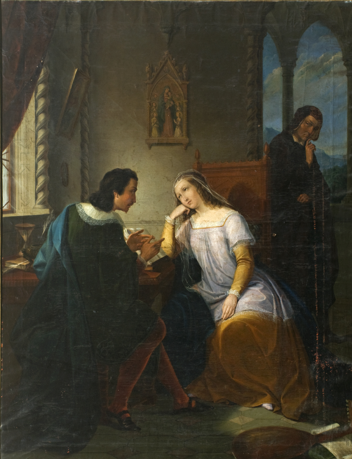 Achille Calzi Senior, Abelardo ed Eloisa, olio su tela 113 x 85 cm., Pinacoteca Comunale Faenza, inv. n. 979, Foto realizzate a cura dell’Istituto per i Beni Artistici Culturali e Naturali della Regione Emilia-Romagna nell’ambito delle attività di catalogazione finanziate dalla Legge Regionale 18/2000.